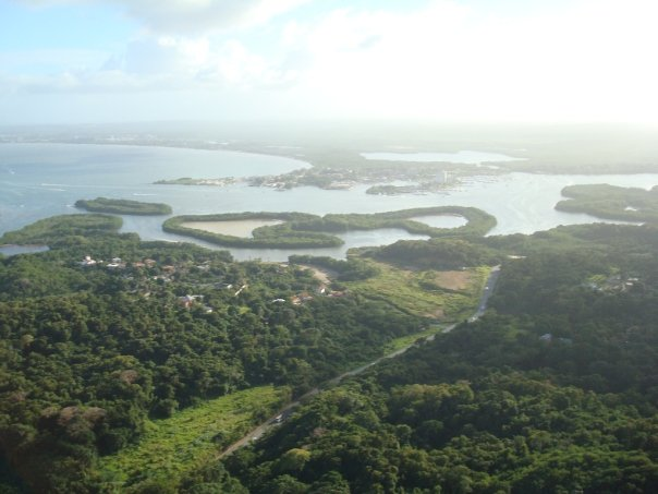 Buche Higuerote, estado Miranda Venezuela (2008)